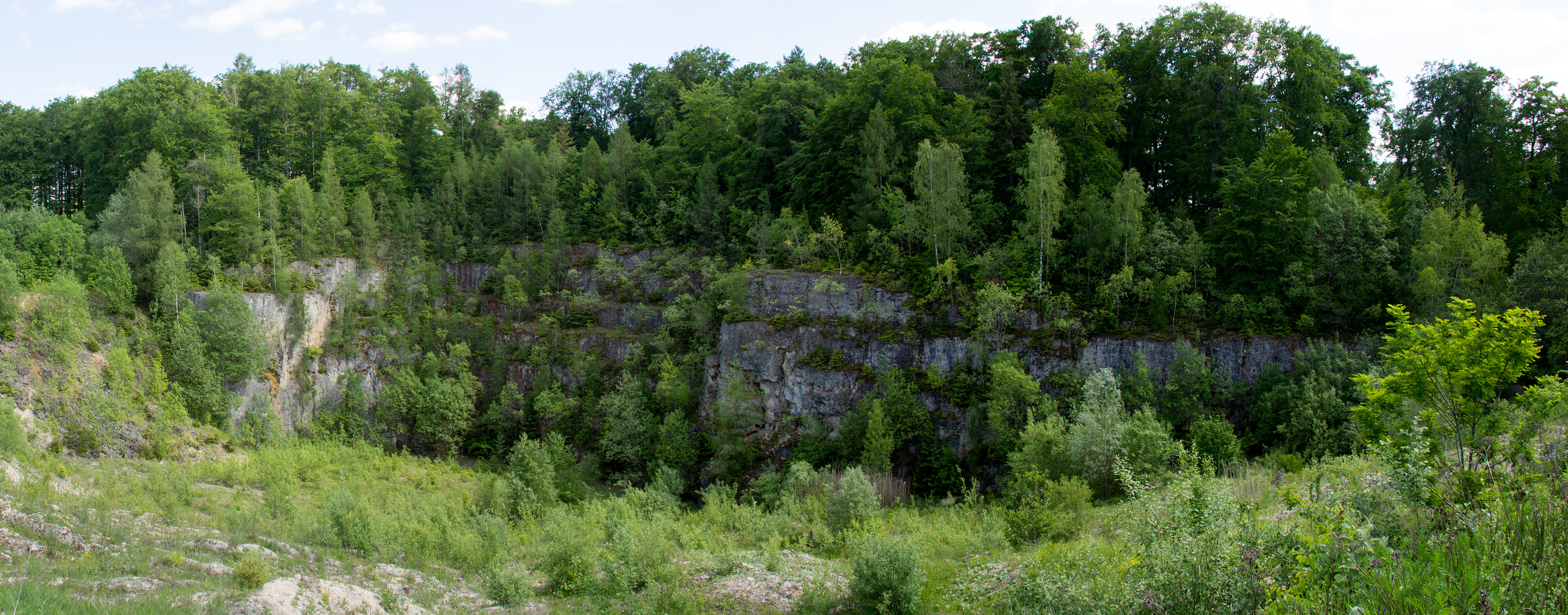 Treuchtlinger (Weißenburger) Marmor ist eine Handelbezeichnung für den tatsächlichen Marinen Jurakalk